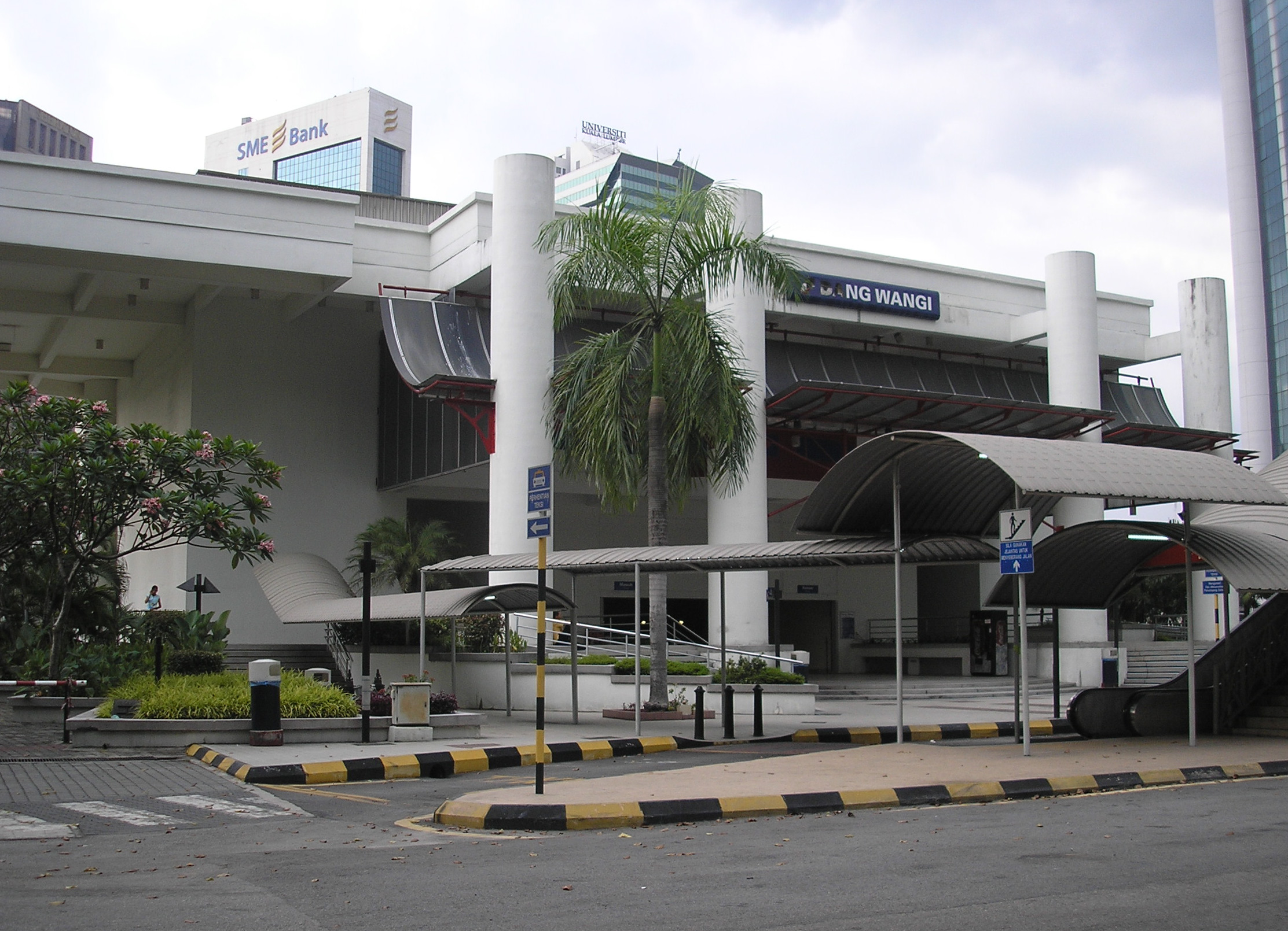 The Dang Wangi LRT station (Kelana Jaya Line) (exterior), Kuala Lumpur, Malaysia.